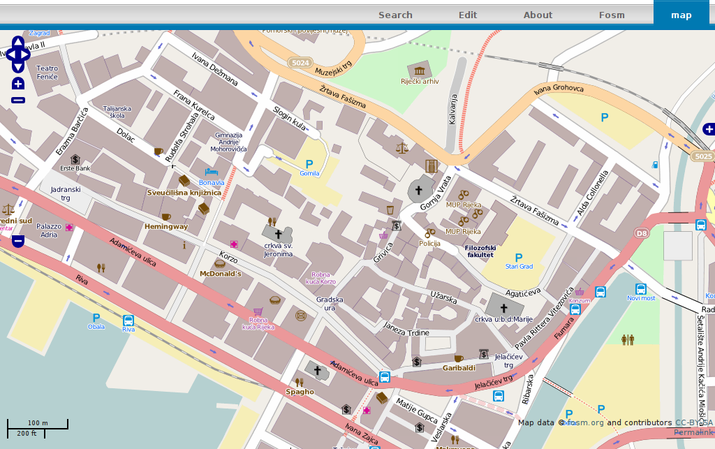 Primjer FOSM karte - središte grada Rijeke